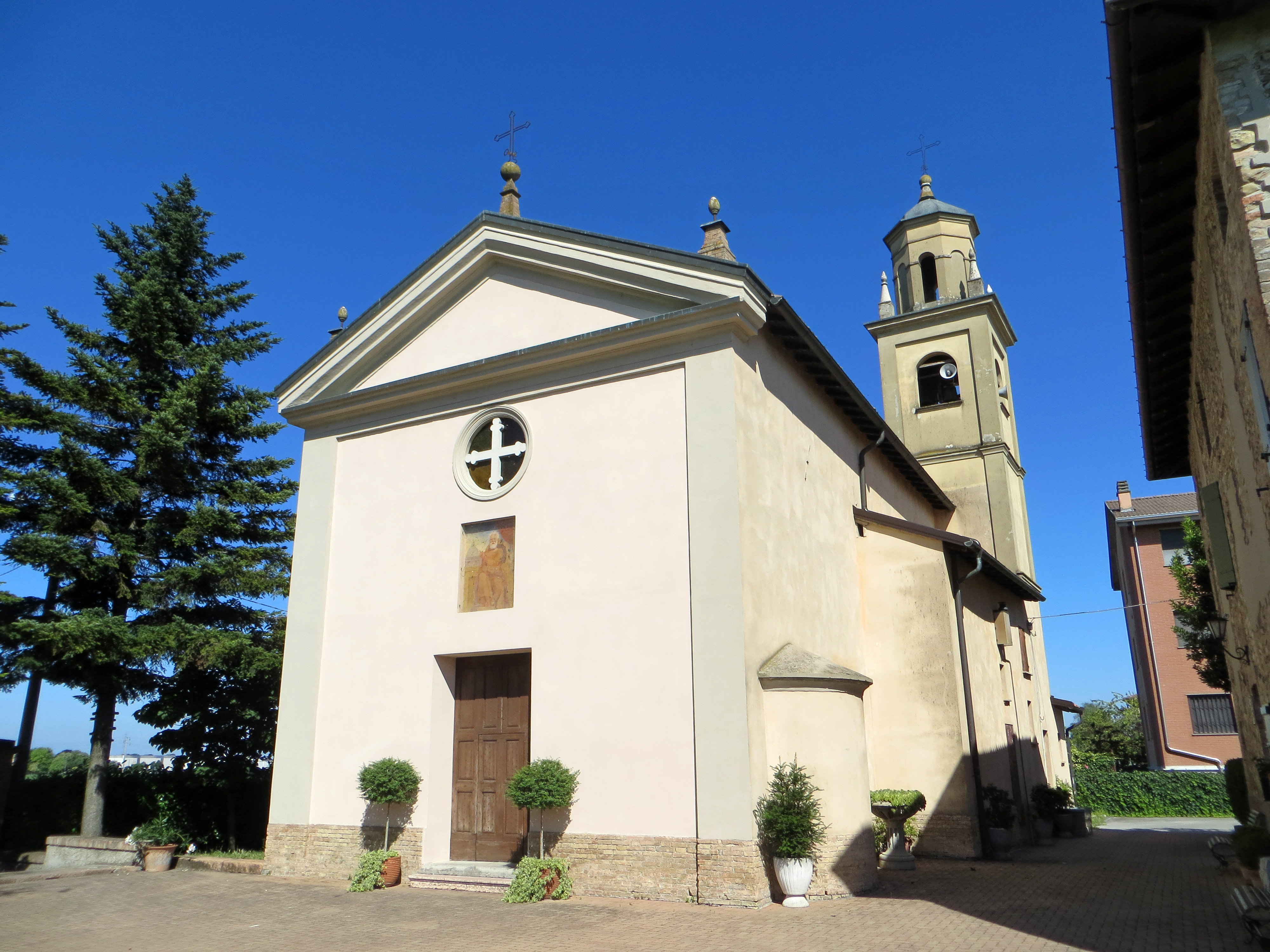 Chiesa di San Pietro Apostolo (Roncopascolo, Parma) - facciata e lato sud